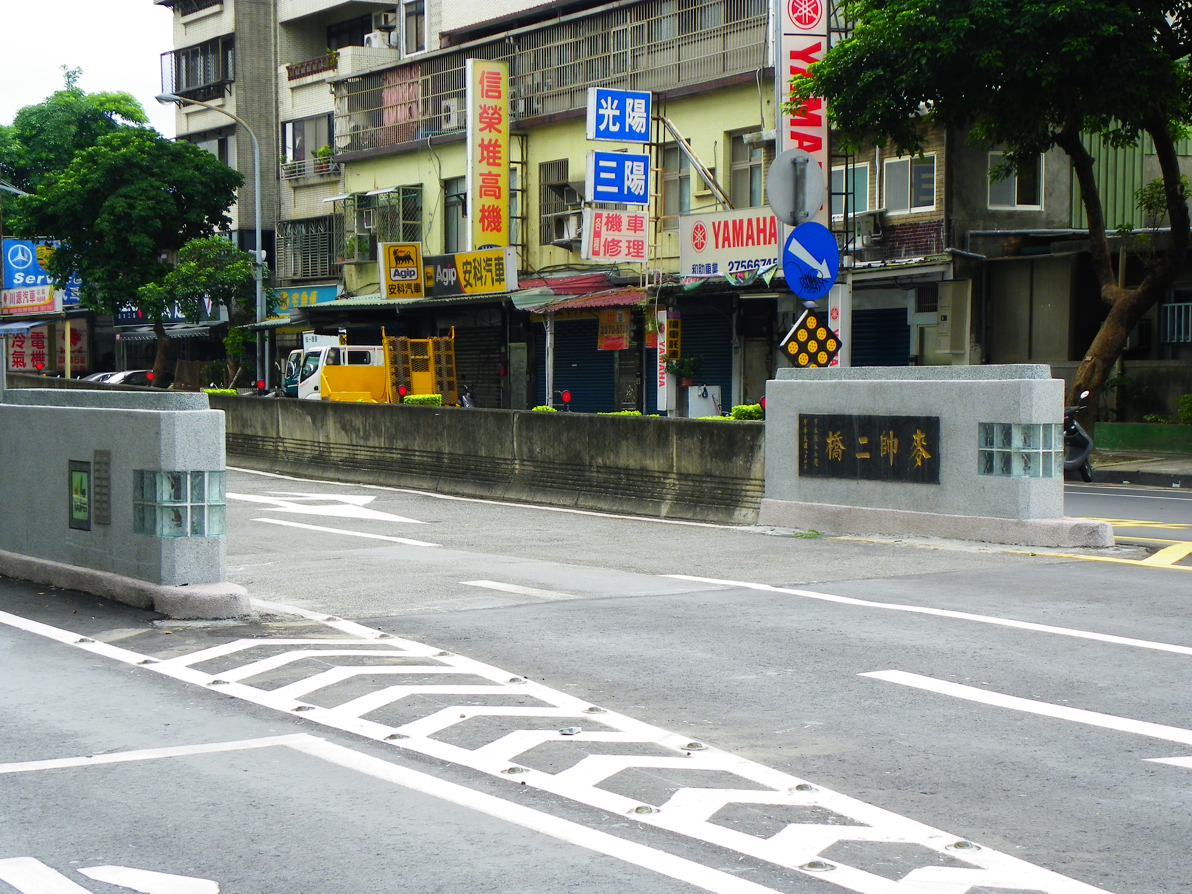 麥帥二橋松山端健康路橋頭，橋額1995年（中華民國84年）臺北市市長陳水扁題。